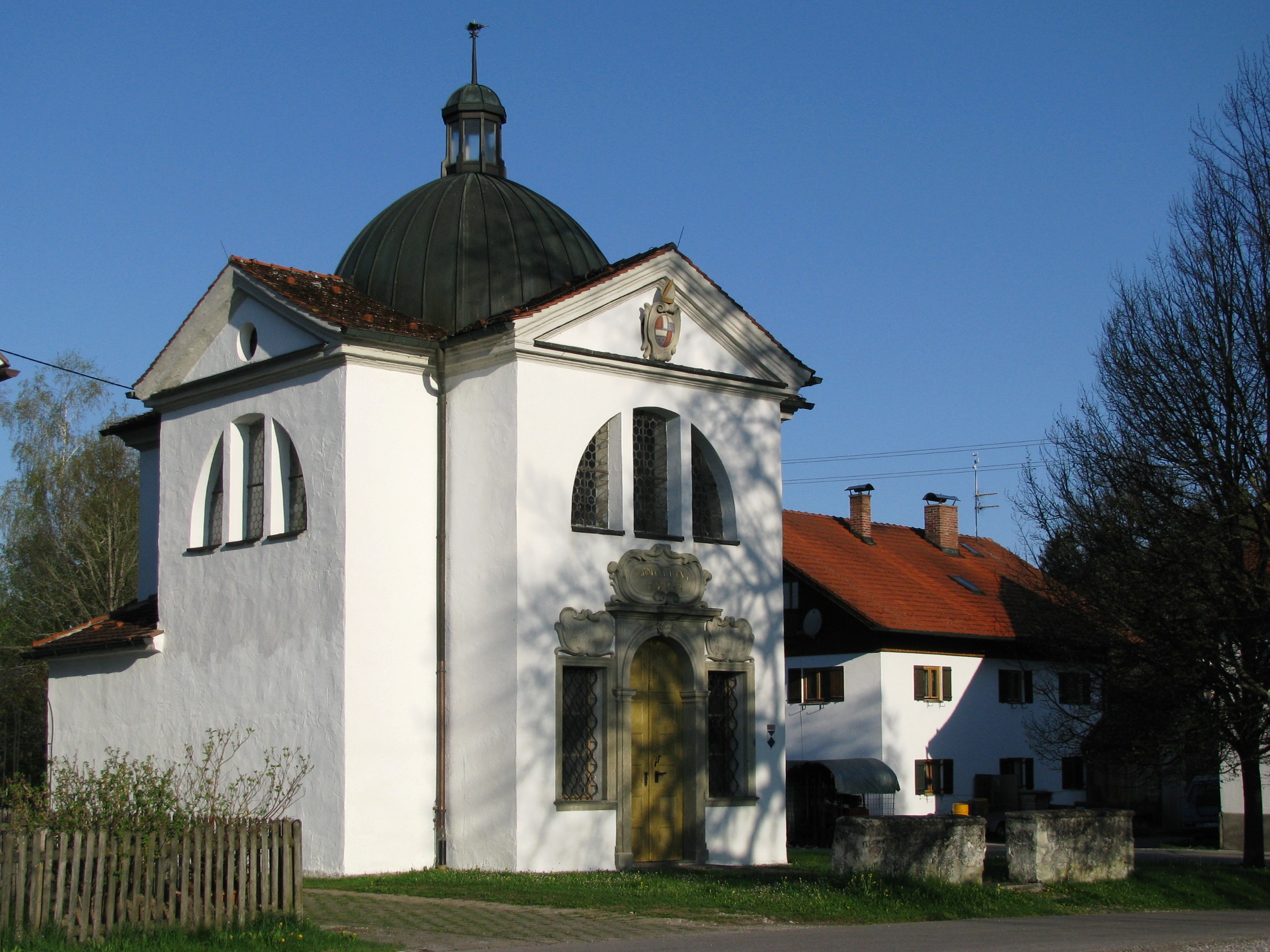 Kath. Kapelle Mariä Sieben Schmerzen; Ansicht aus südöstlicher Richtung